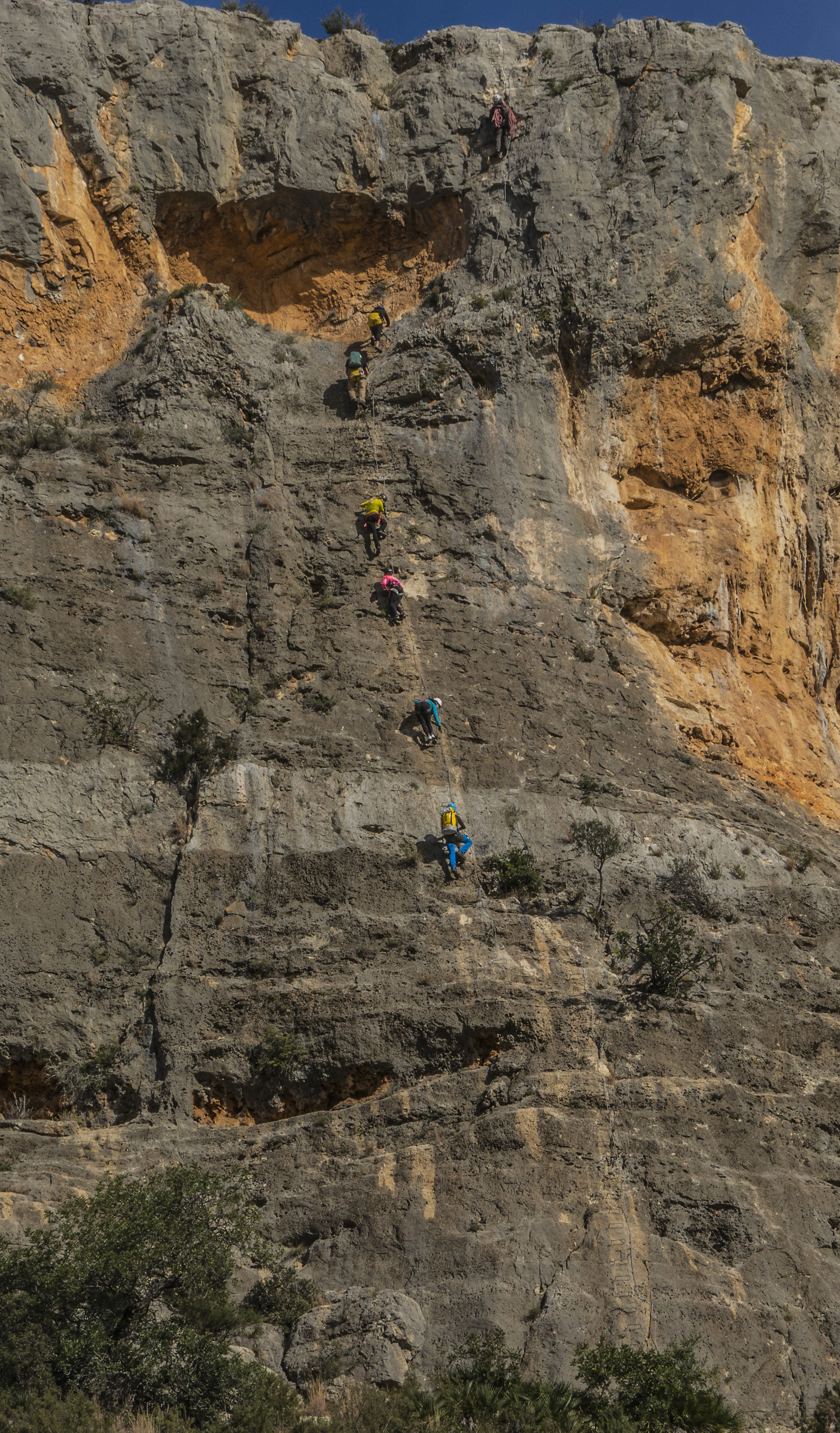 Està situada al terme de Tous.